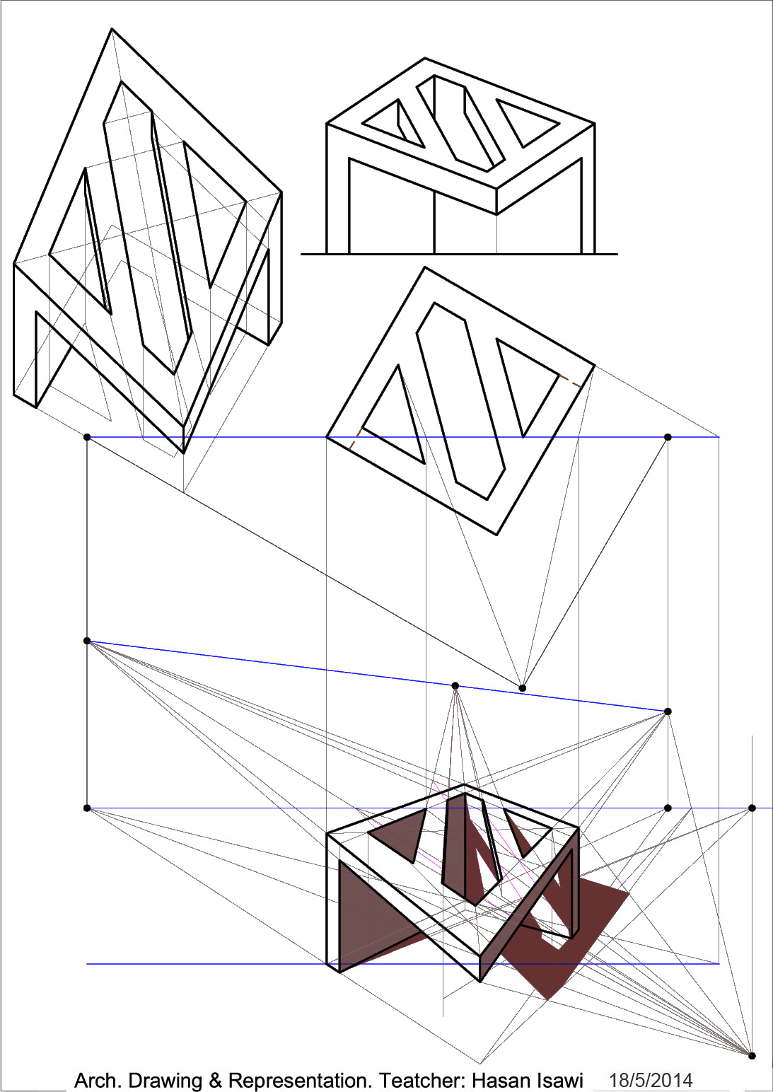 نظرية الظلال في طريقة المنظور applicazione delle ombre nella prospettiva (metodo indiretto)